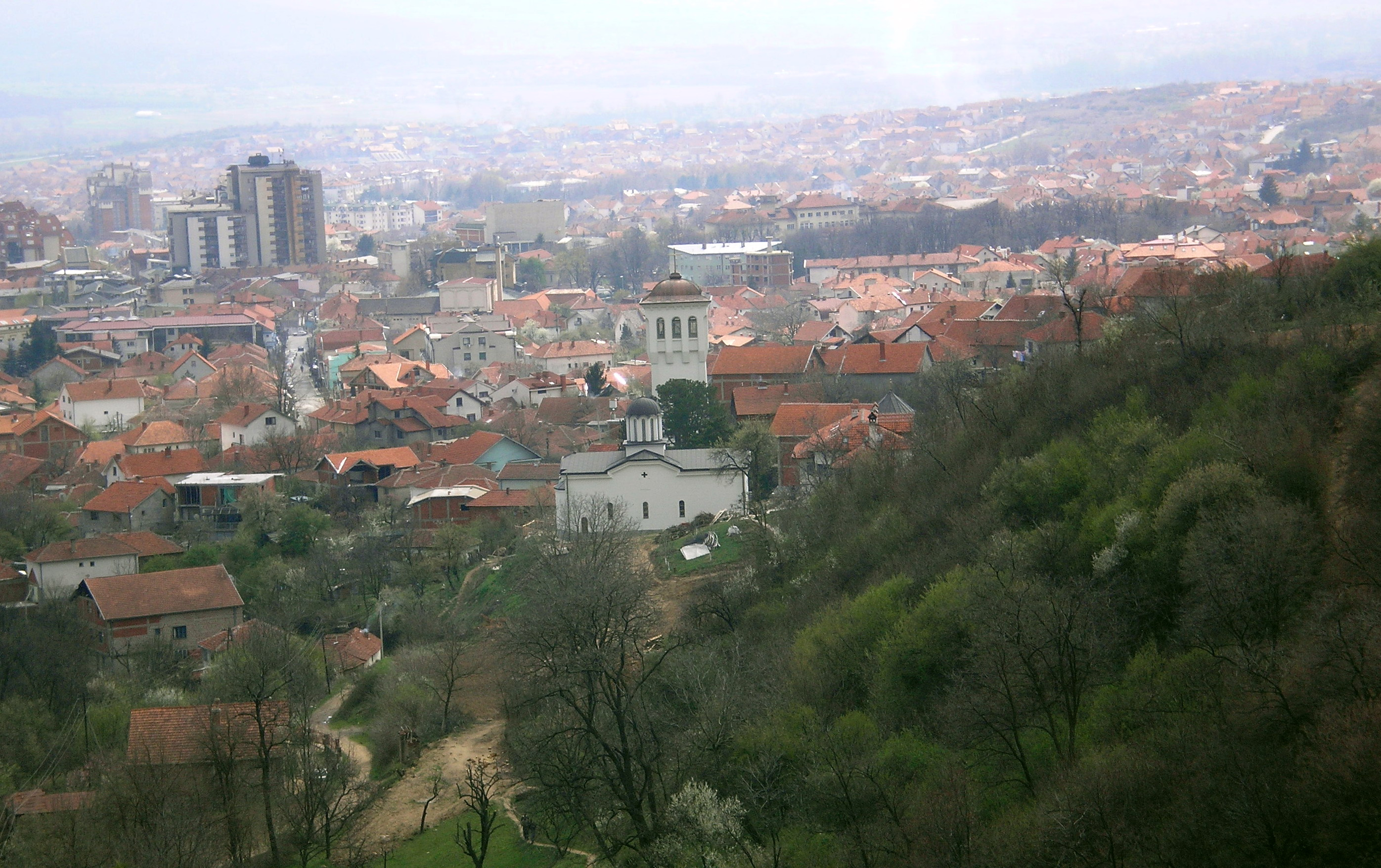 panorama Vranja